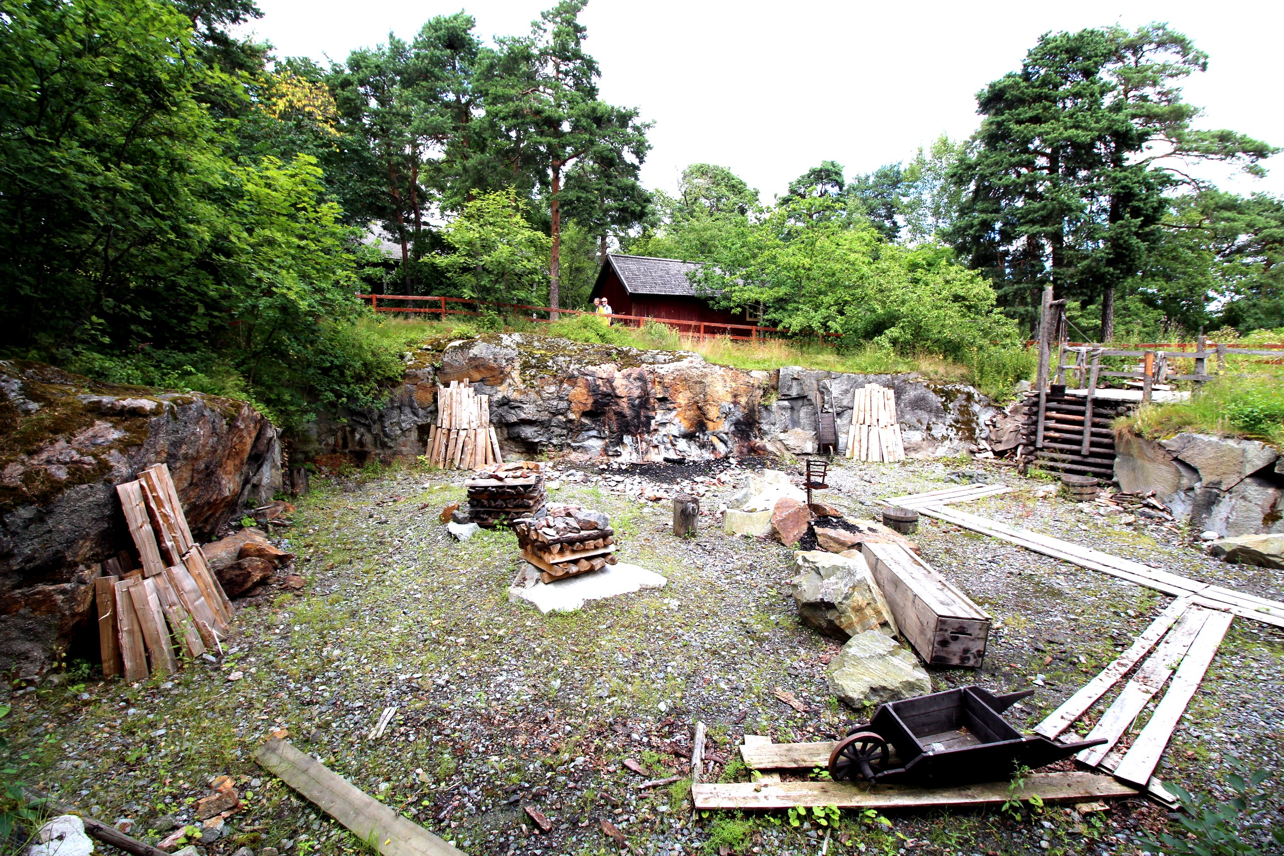 Motjärnsgruvan, Skansen. Dagbrott som ska illustrera malmbrytning under 1700-talet